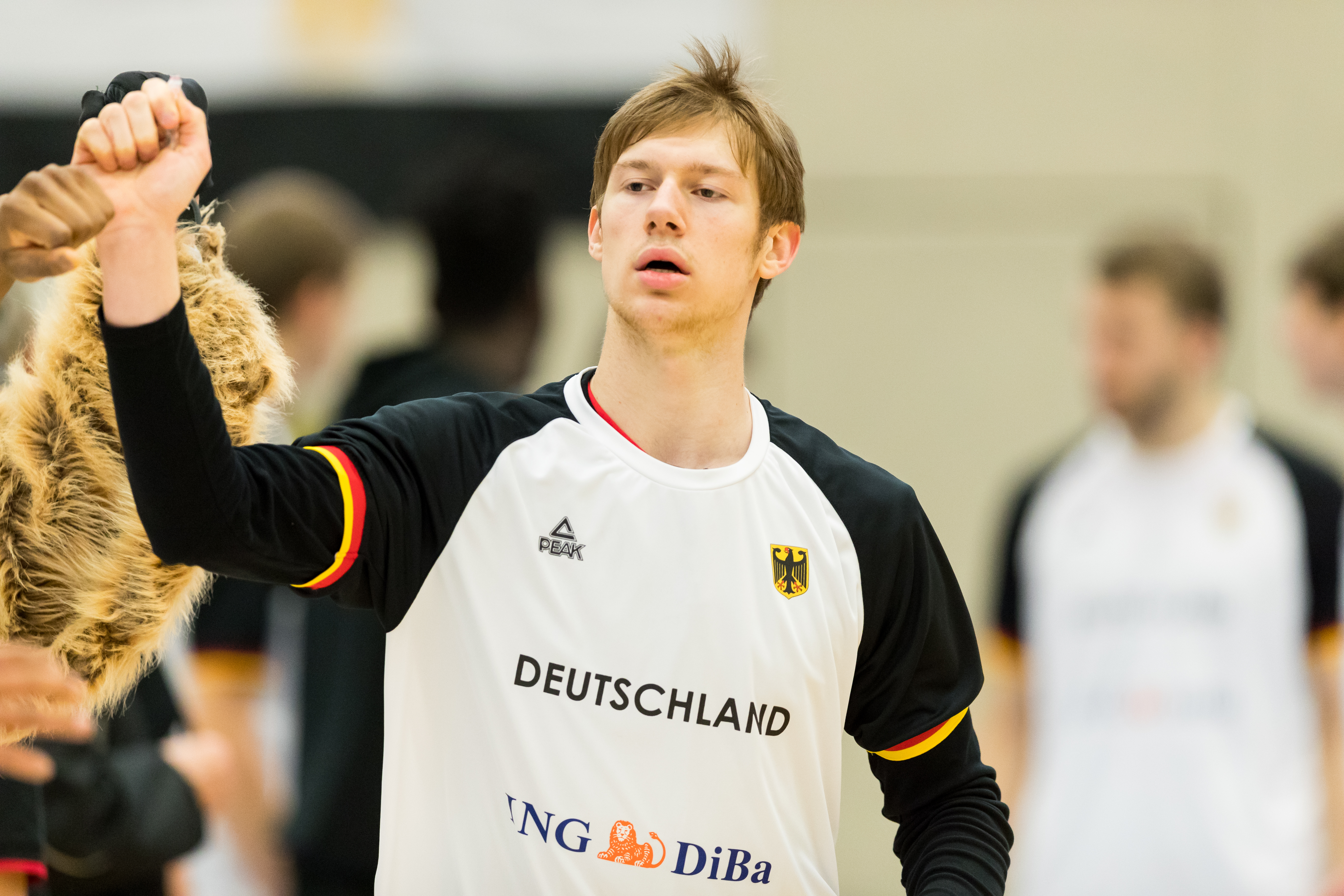 Germany vs Turkey 74:70 during Basketball Albert Schweitzer Turnier at GBG Halle, Mannheim, Baden-Württemberg, Germany on 2018-04-02, Photo: Sven Mandel